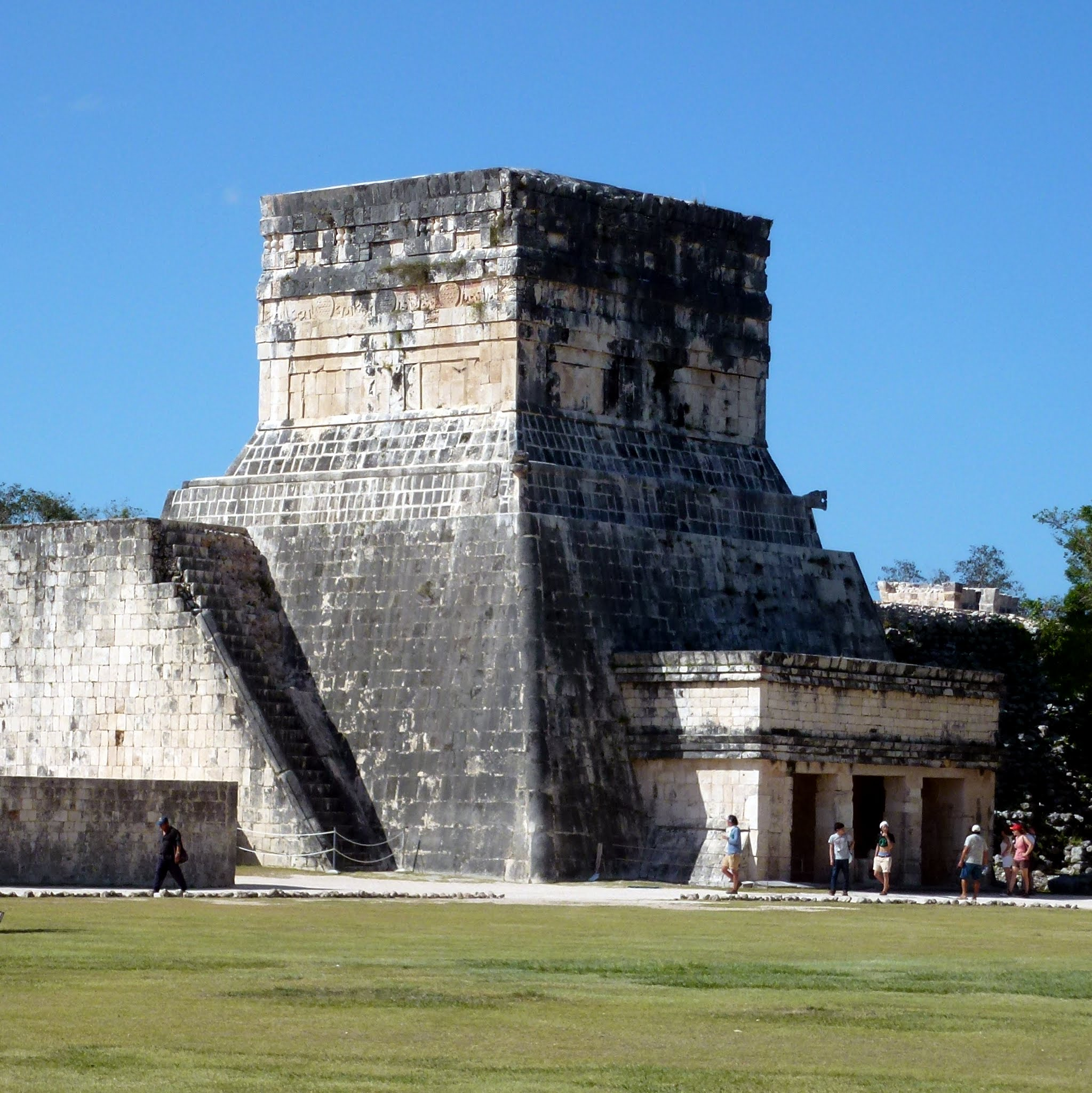 Chichen Itza